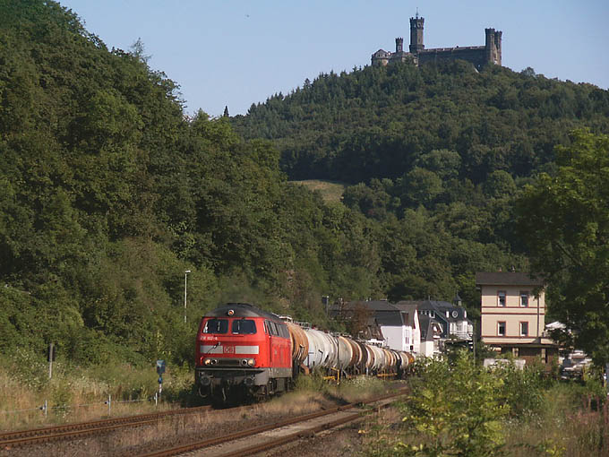 216 102 zieht am 29.07.2003 den nur Dienstags verkehrenden damaligen KC 62529 durch den Bahnhof Balduinstein (Lahntalbahn)